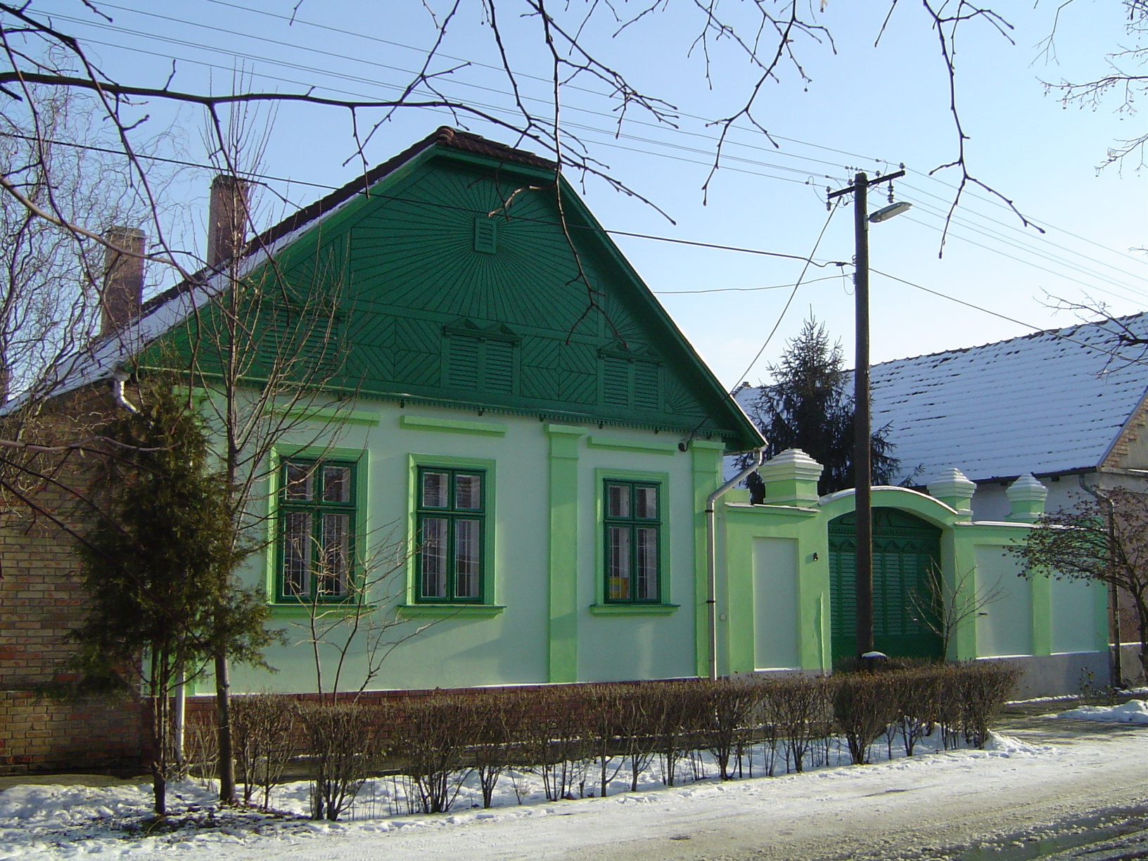 Napsugaras ház (1882), Szeged, Alsóváros